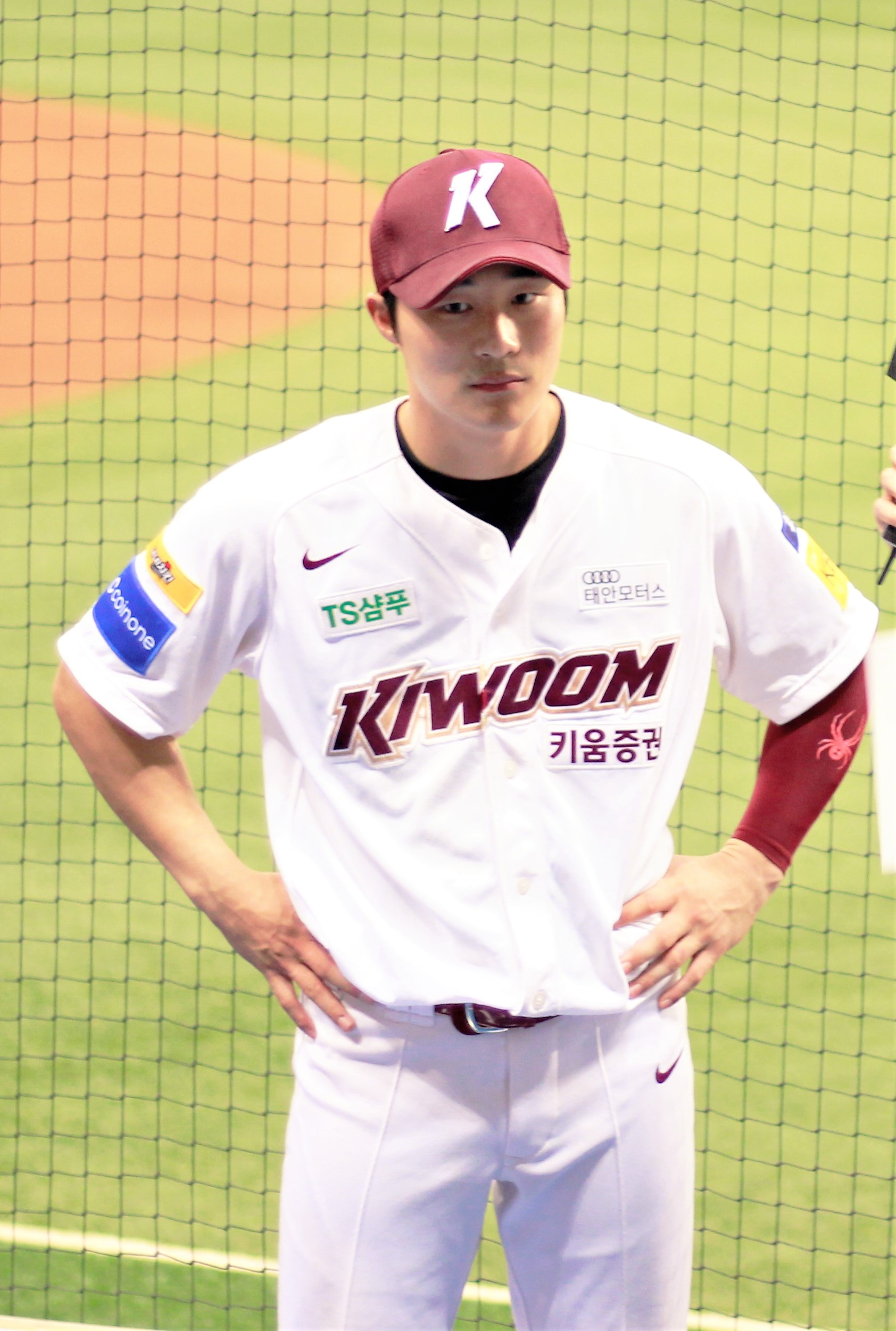 키움 히어로즈의 김하성 선수가 고척돔에서 수훈선수 인터뷰에 응하고 있다.